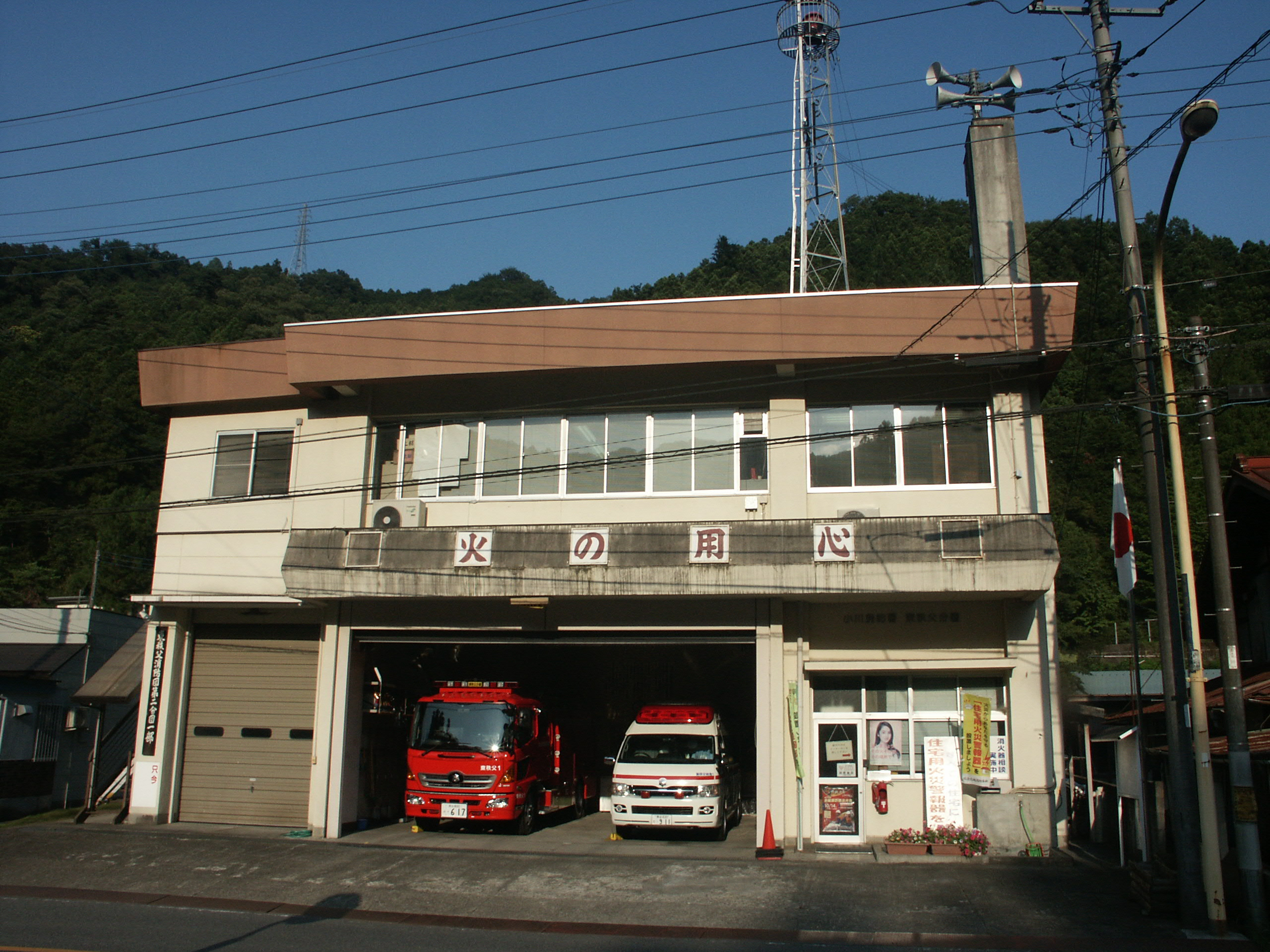 比企広域消防本部小川消防署東秩父分署庁舎